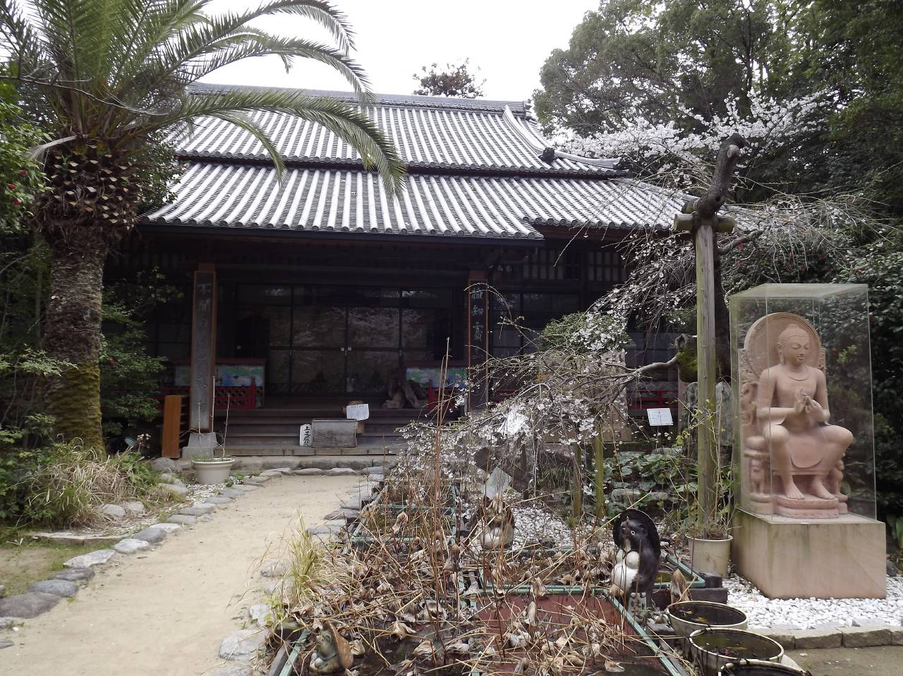 石手寺の大講堂とみかえり桜